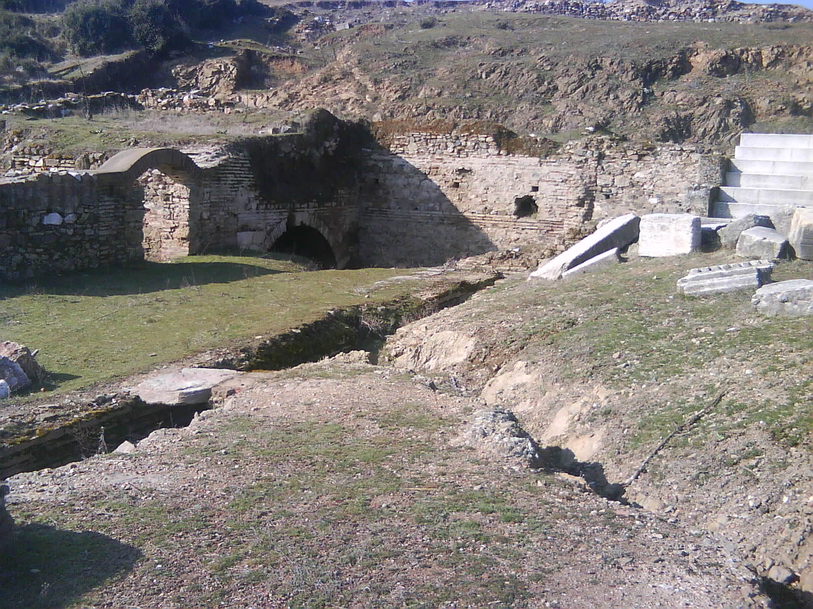 Isar, Marvinci